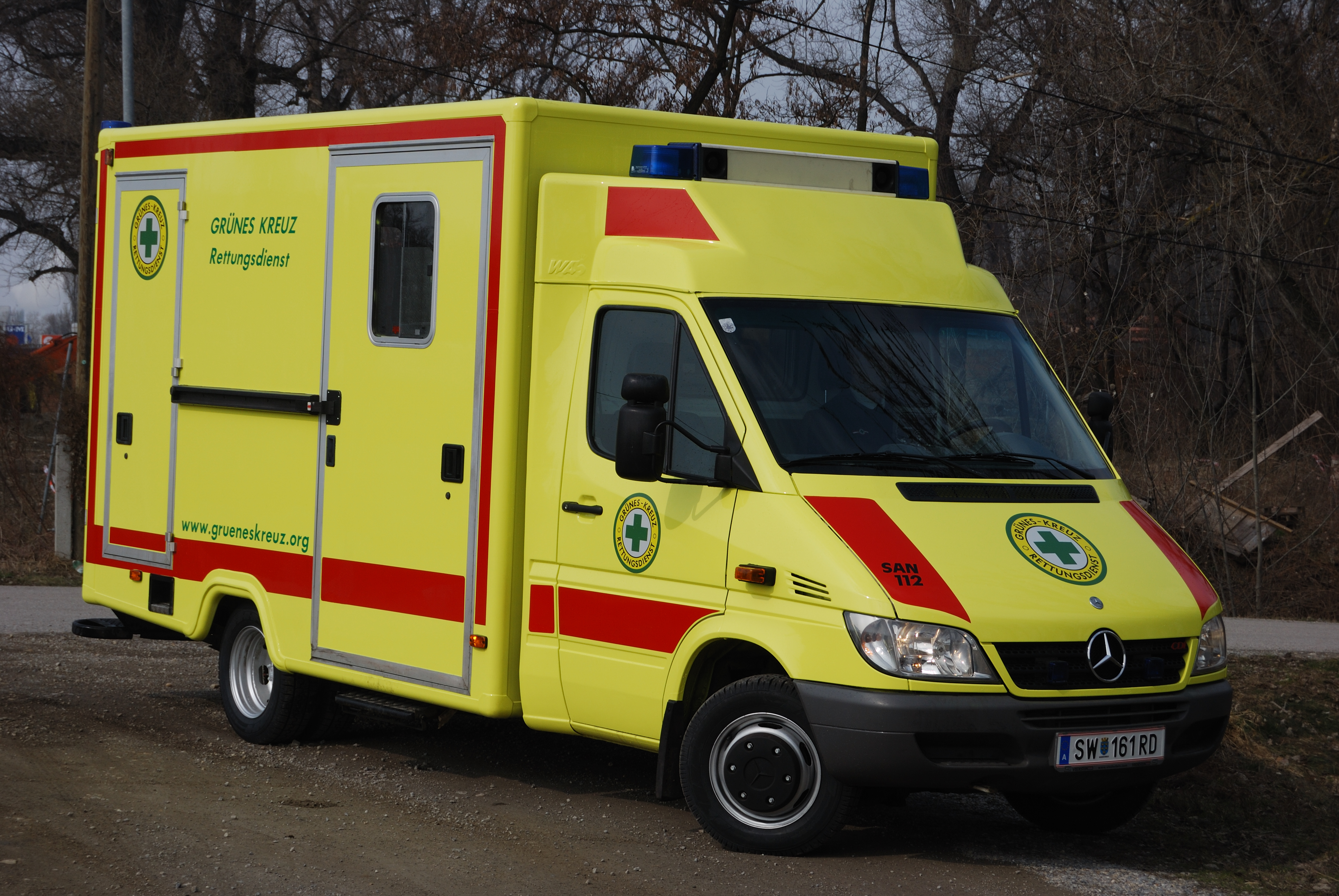 Ein Rettungswagen des Typ Mercedes Sprinter Koffer der Rettungsorganisation GRÜNES KREUZ.